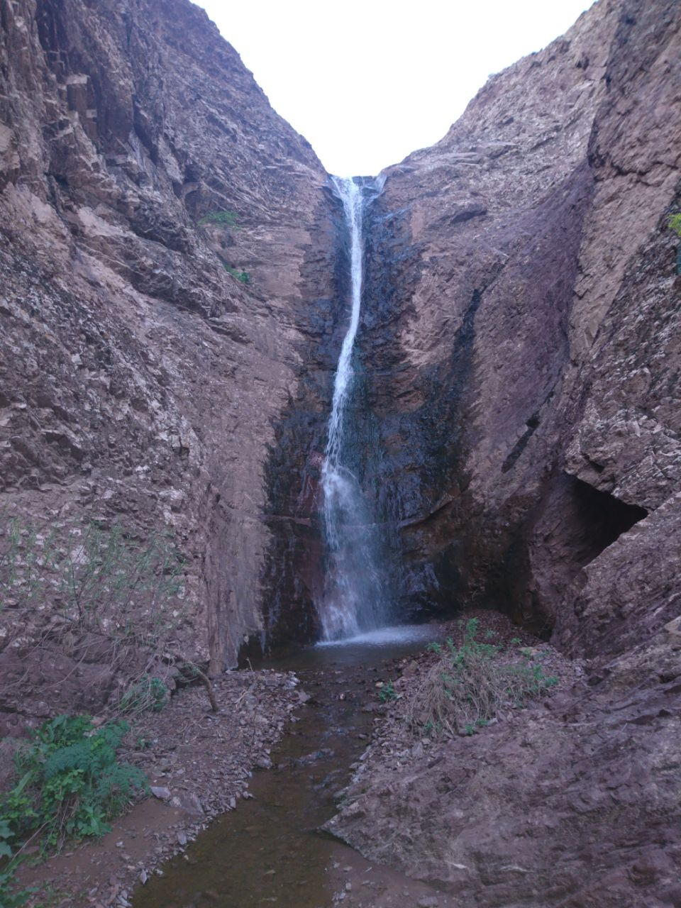 معدن آق دربند